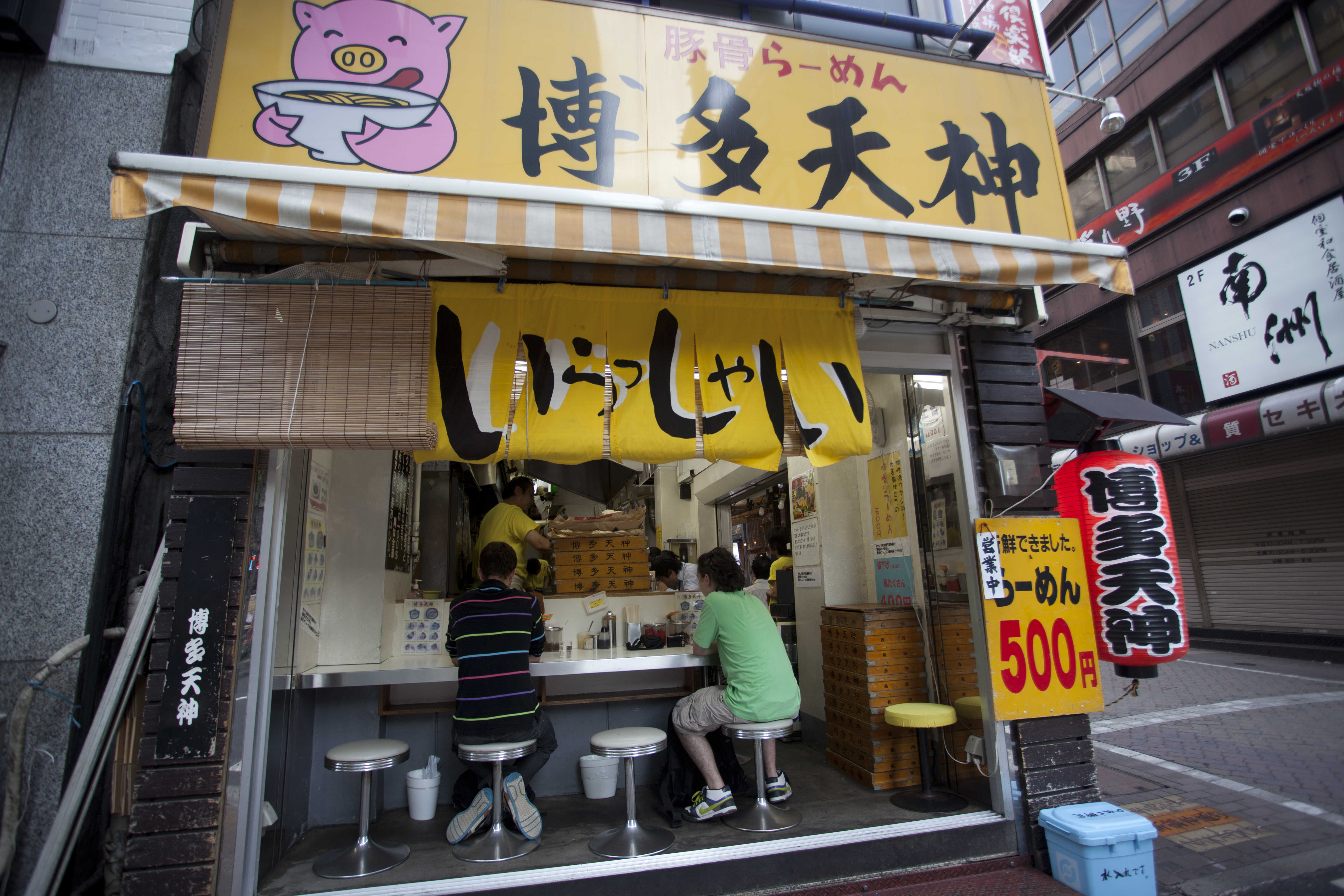 Tokyo2010_MG_6074-1